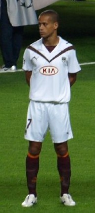 Wendel Geraldo Maurício da Silva